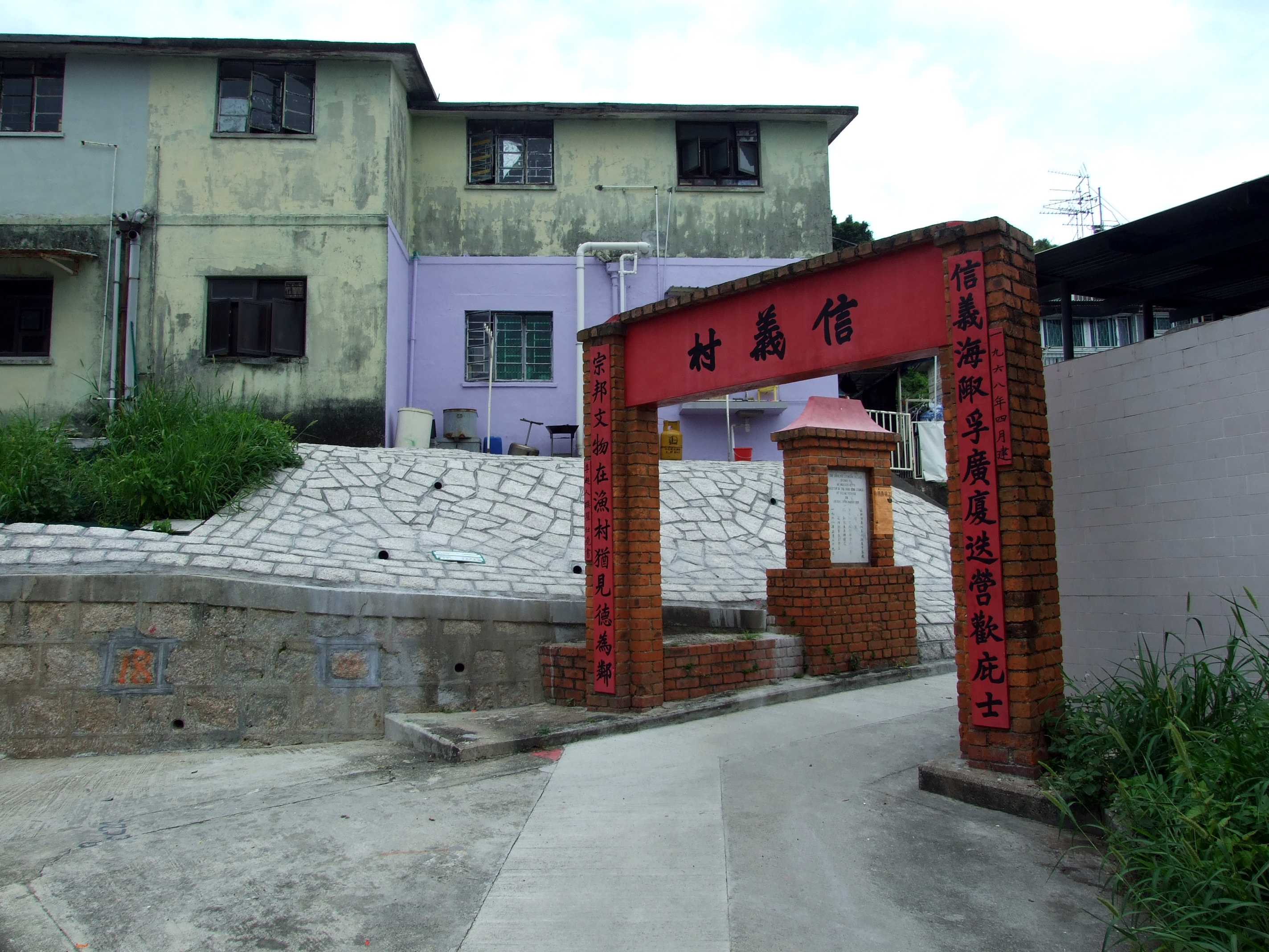 中文（香港）: 長洲信義新村第二期